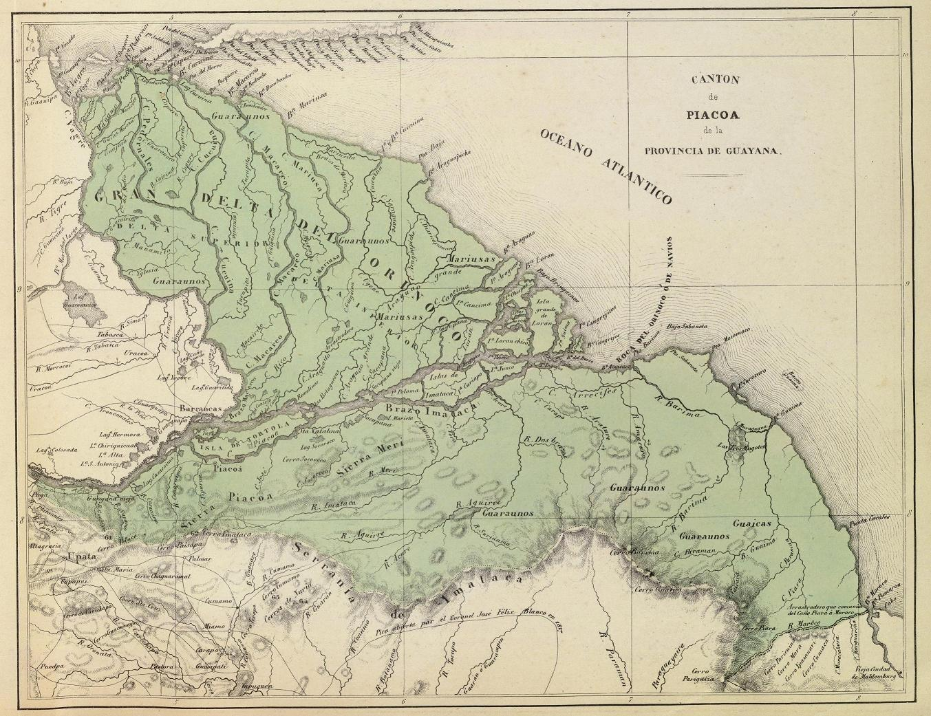 Cantón Piacoa de la Provincia de Guayana. Tomado del "Atlas físico y político de la República de Venezuela", 1840.